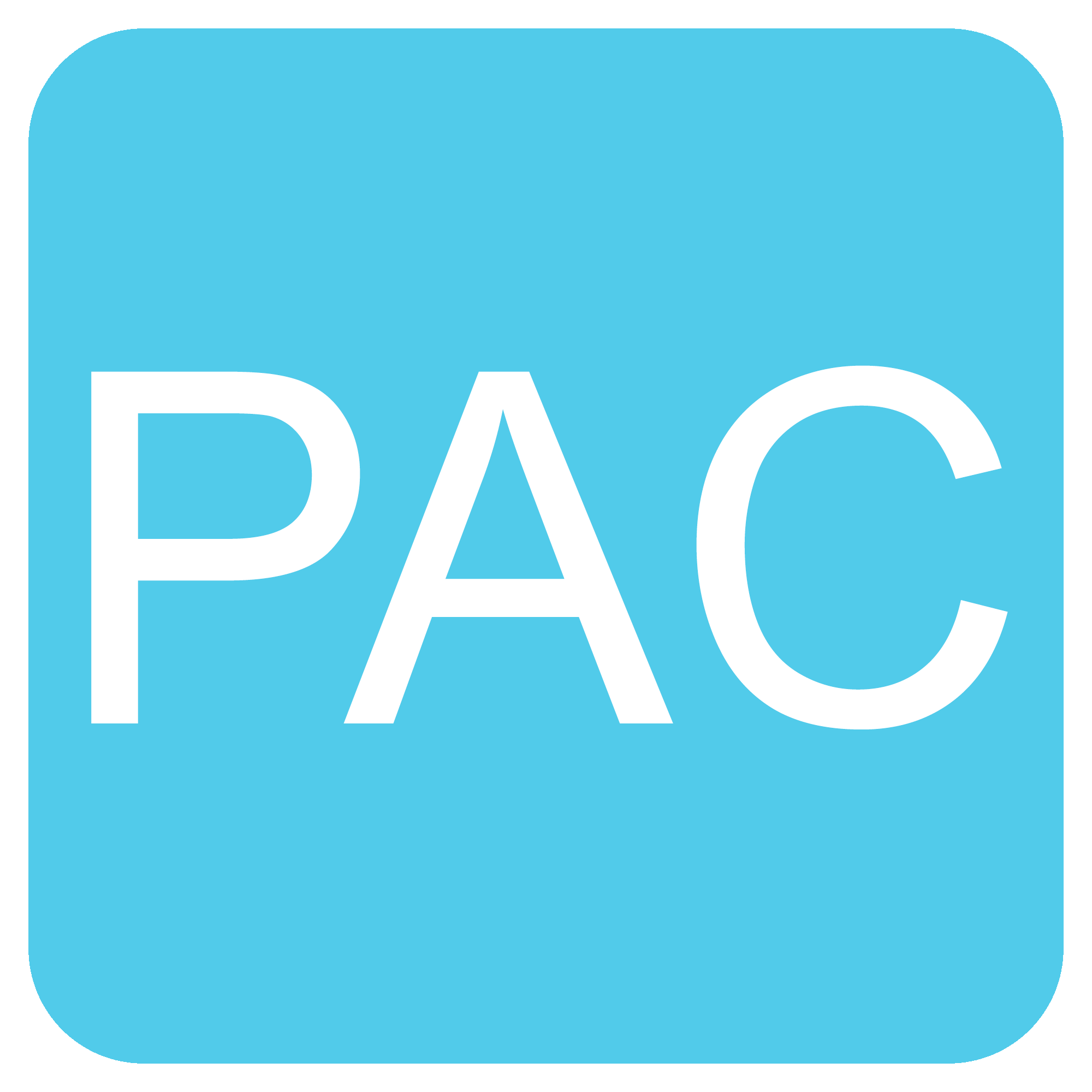 Símbolo utilizado para identificar a la estación Pedro Aguirre Cerda en 2001.